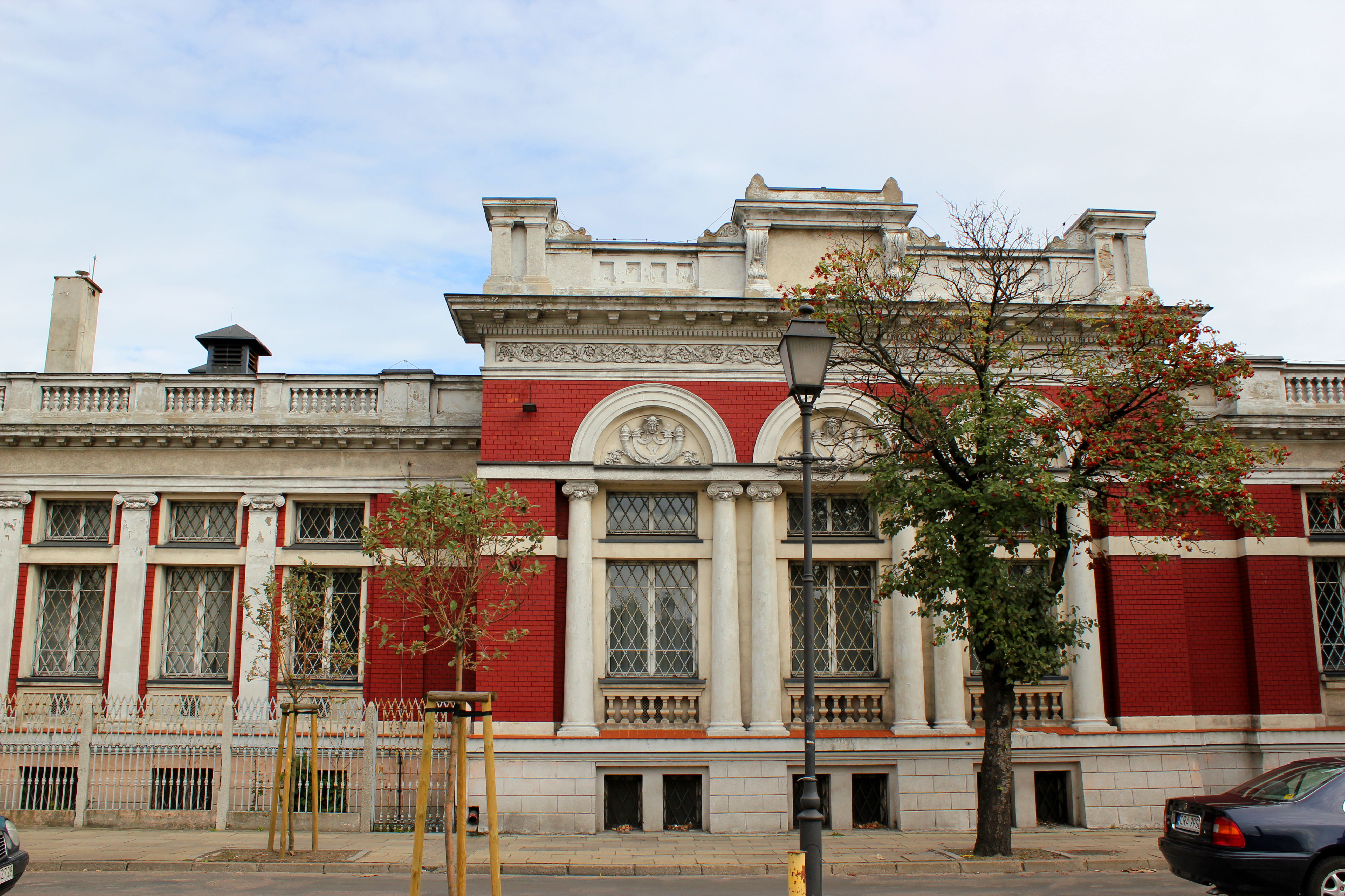 Bank Gospodarstwa Krajowego, 1911 Włocławek, ul. Żabia 2, miasto Włocławek